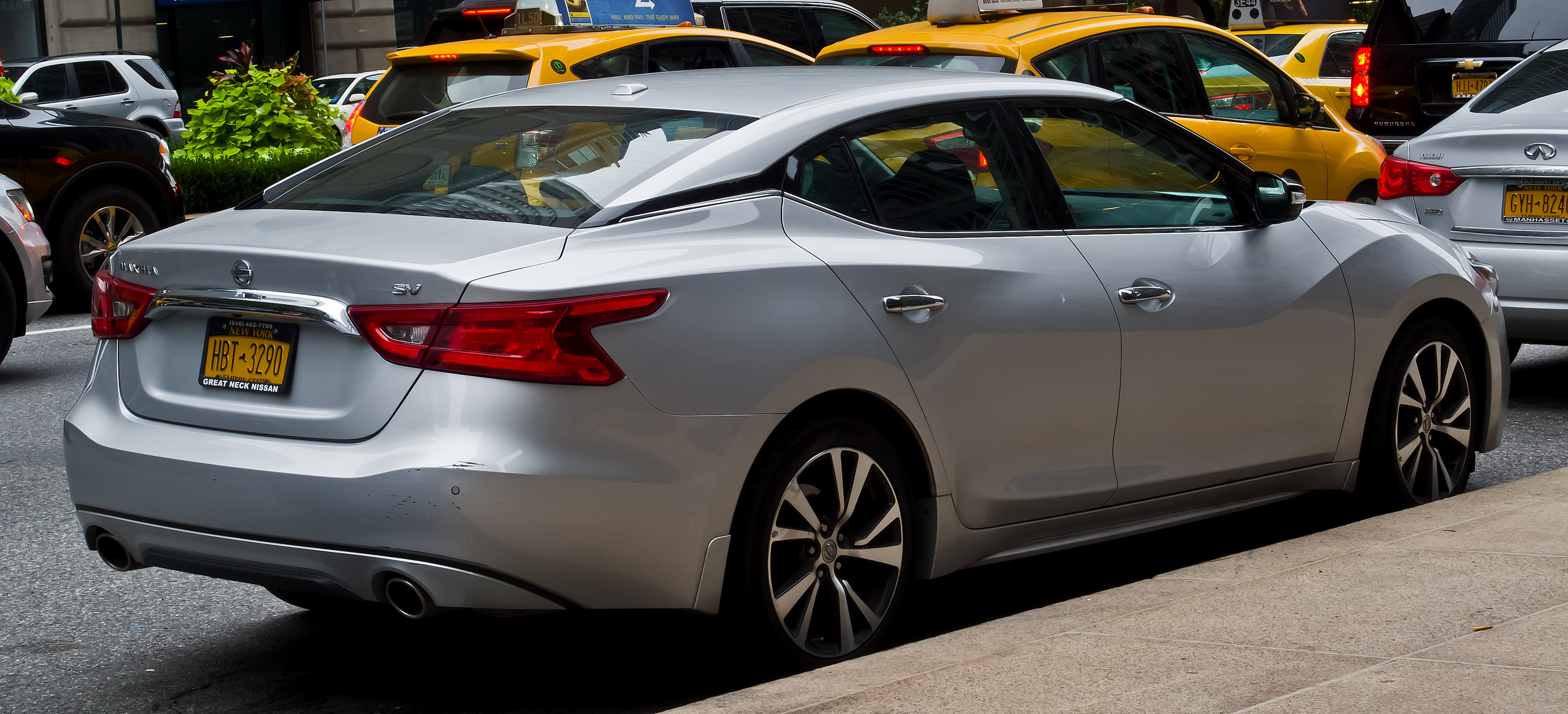 Nissan Maxima SV (A36)